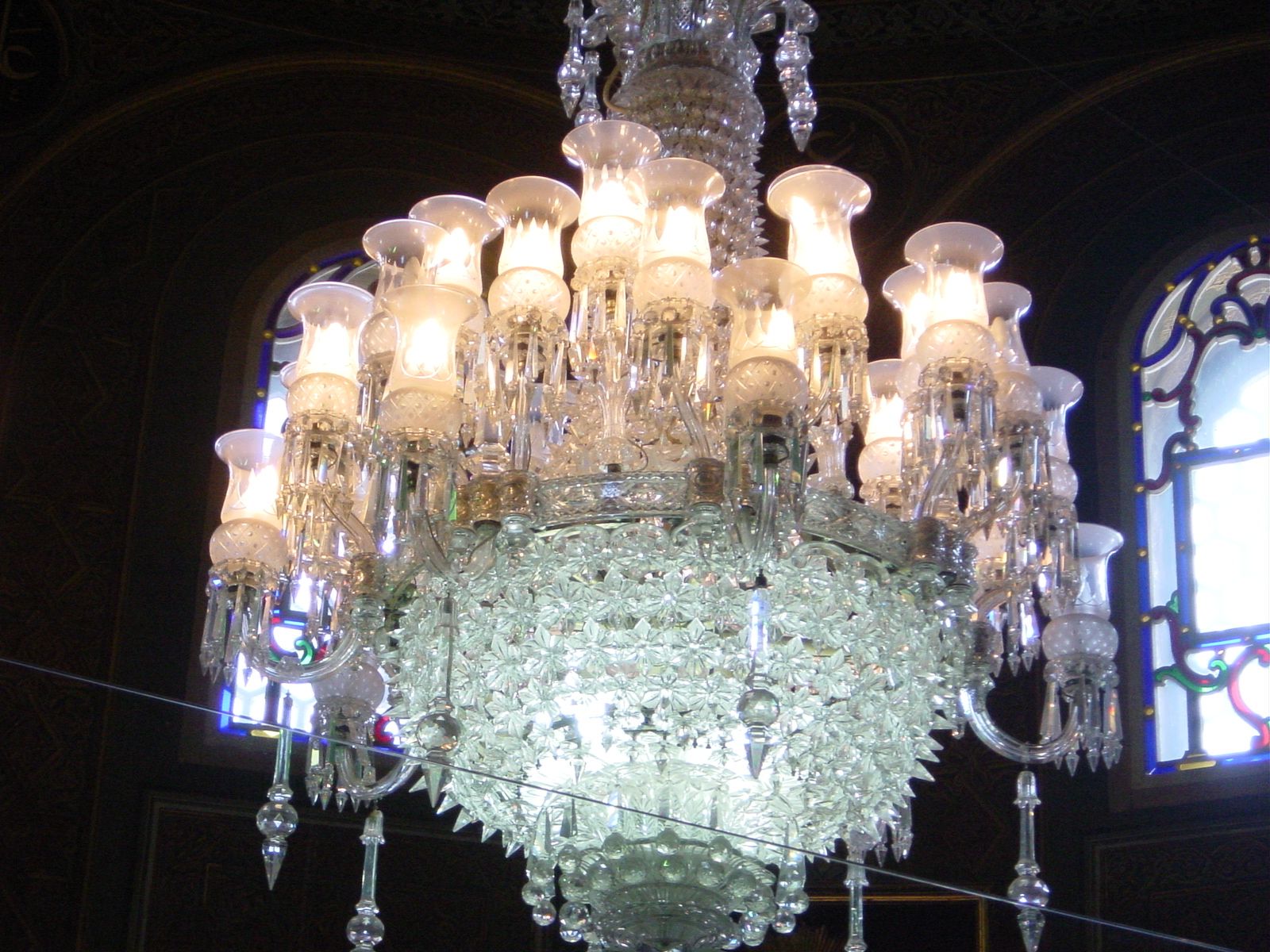 Lampadario della türbe (mausoleo) di Maometto II presso la moschea detta "Fatih camii" ("la moschea del Conquistatore") o "Fatih Memhet camii" ("la moschea di Maometto il Conquistatore"), ad Istanbul. Foto di: Giovanni Dall'Orto, 26-5-2006.